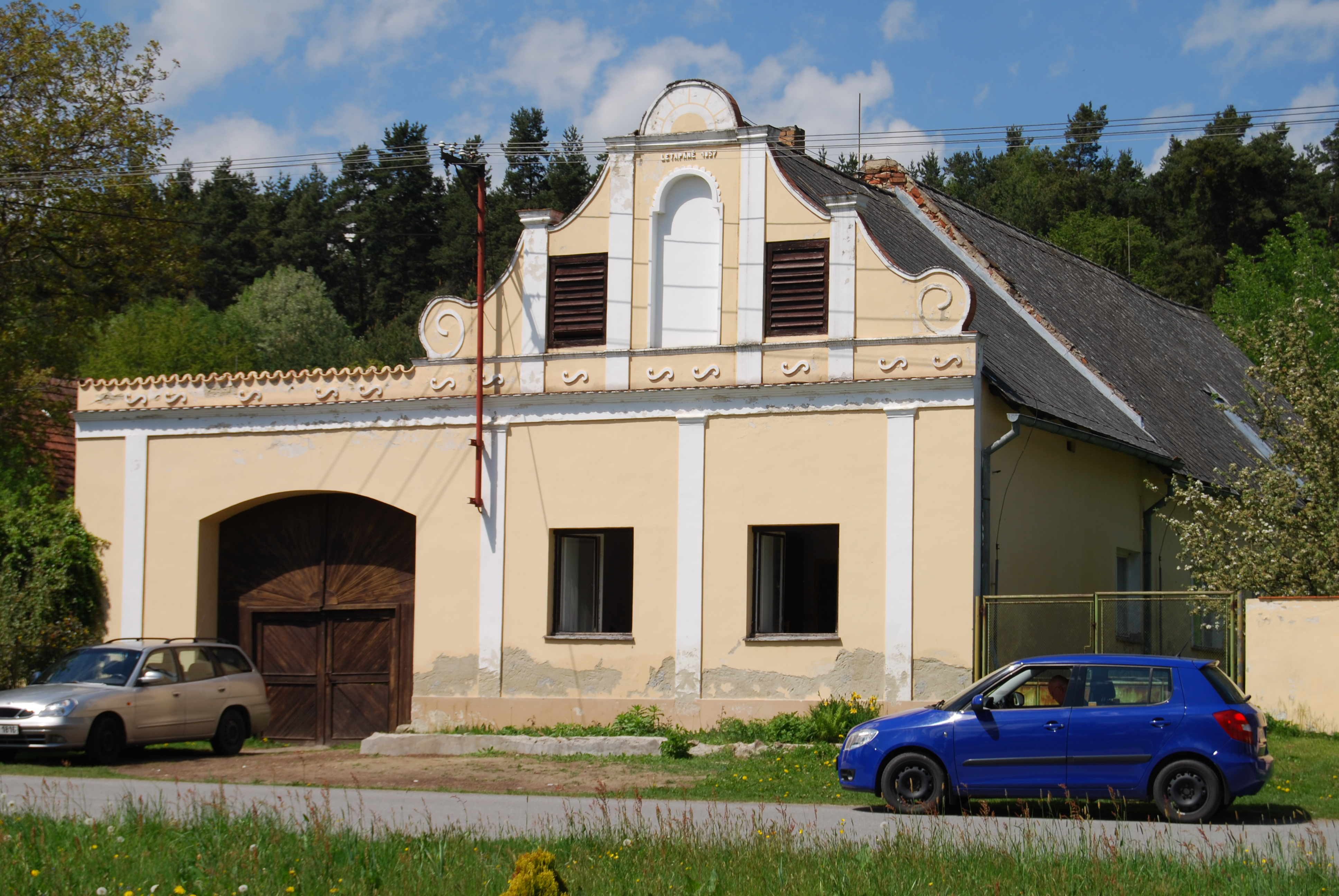 Usedlost čp. 4 v obci z roku 1857 proti kapli. Obec Lipovice se nachází v okrese Prachatice, kraj Jihočeský. Česká republika.